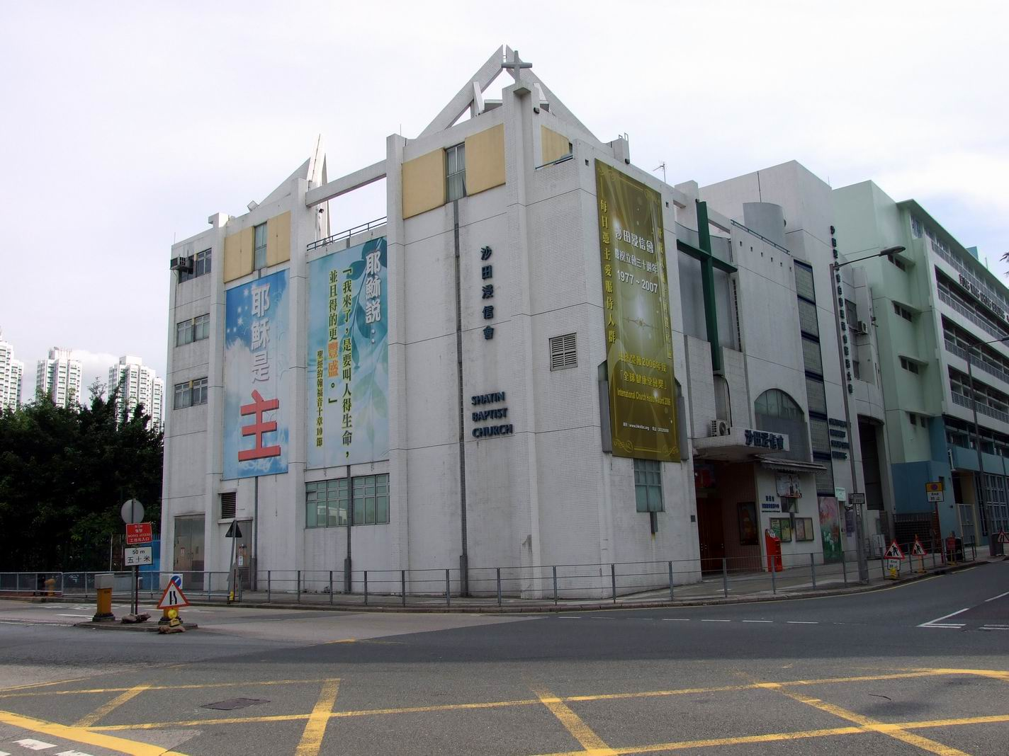 沙田浸信會瀝源座堂